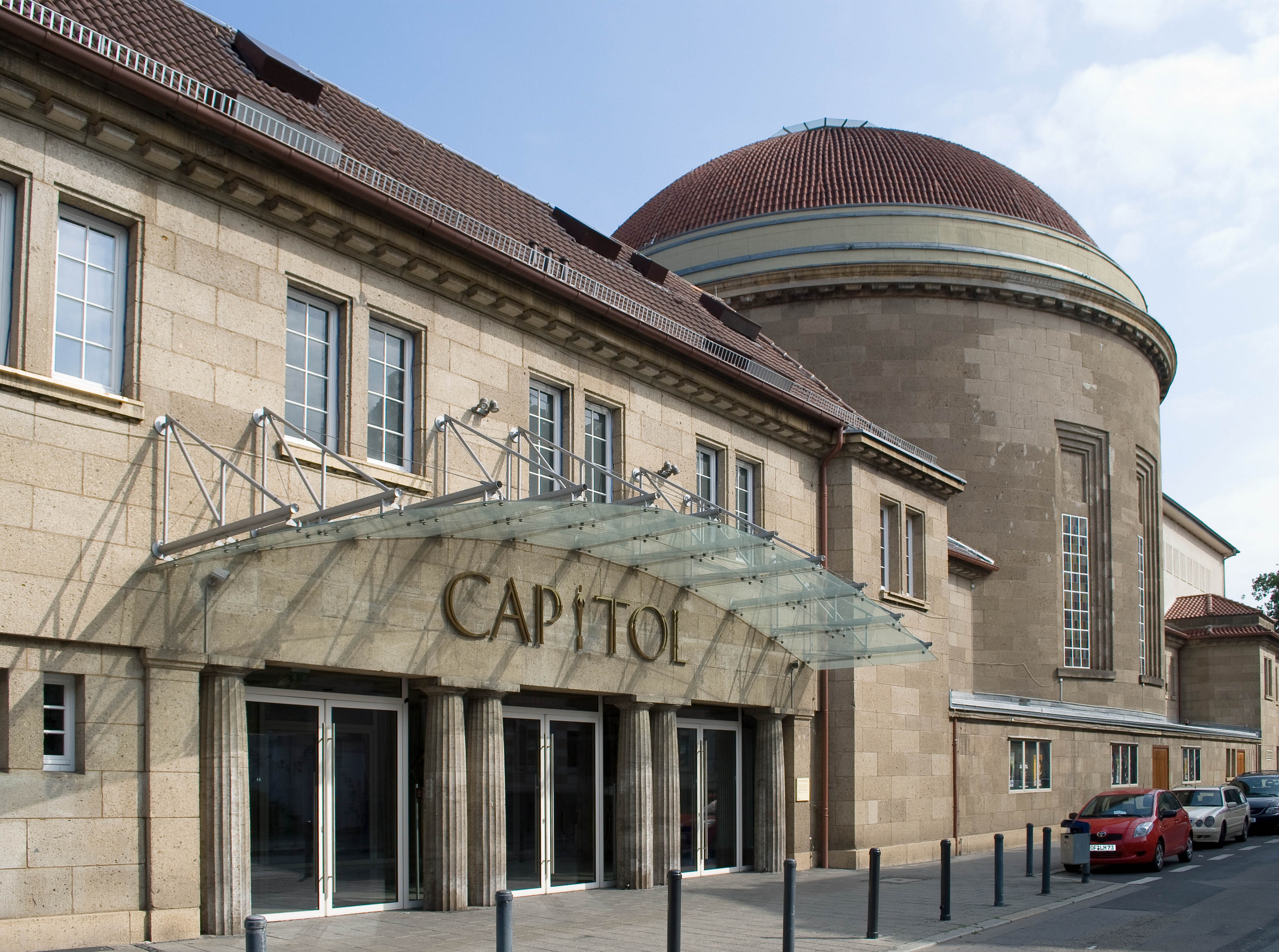 Das Capitol in Offenbach am Main ist die ehemalige Synagoge der Stadt und heute ein Kultur- und Veranstaltungszentrum.